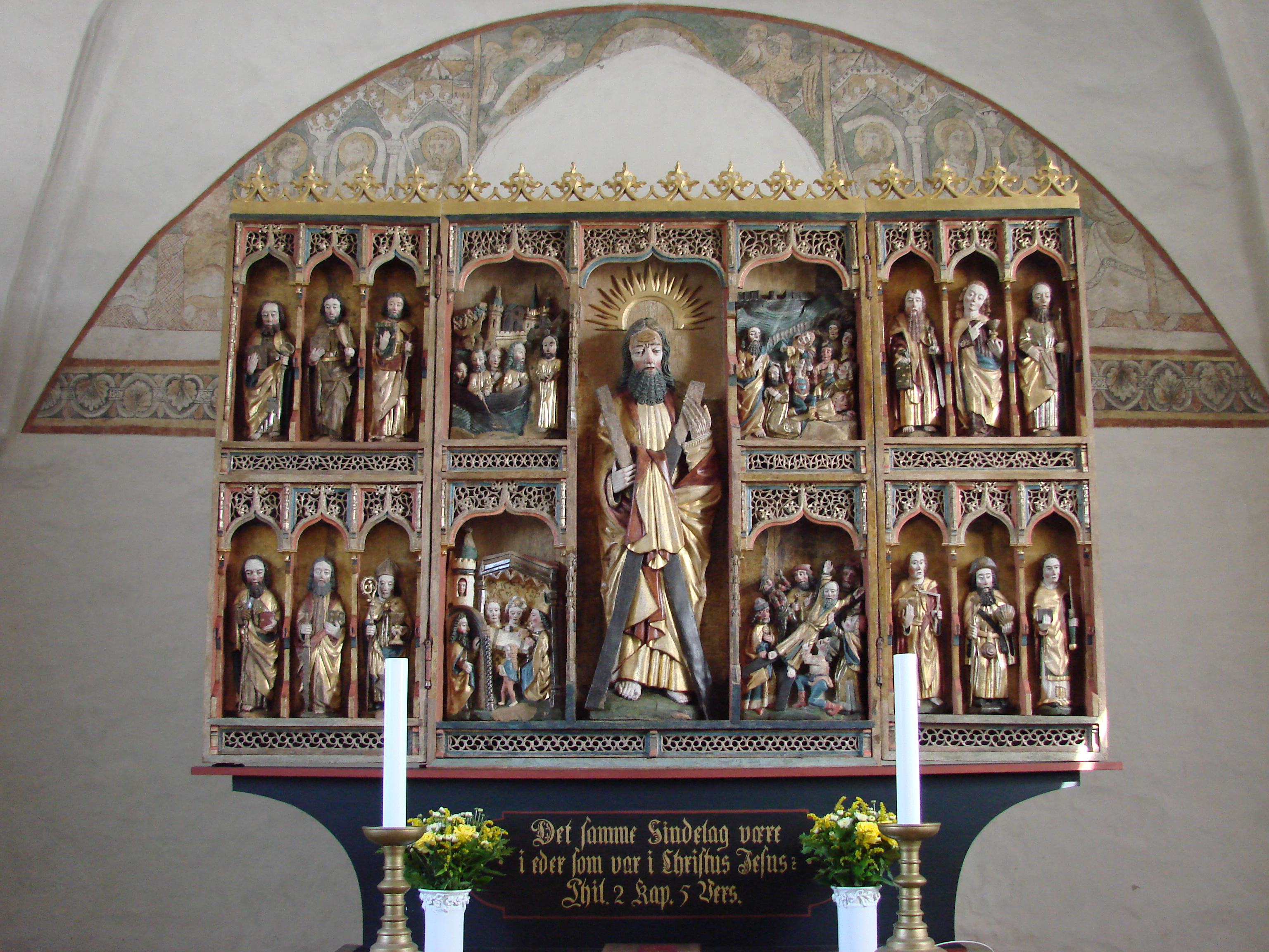 2008 09-07 09-08 Dänemark 247 Moen, Keldby